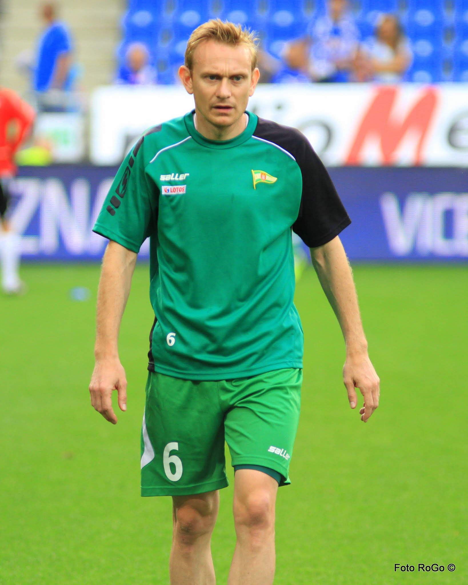 Sebastian Mila w barwach Lechii Gdańsk w 2015